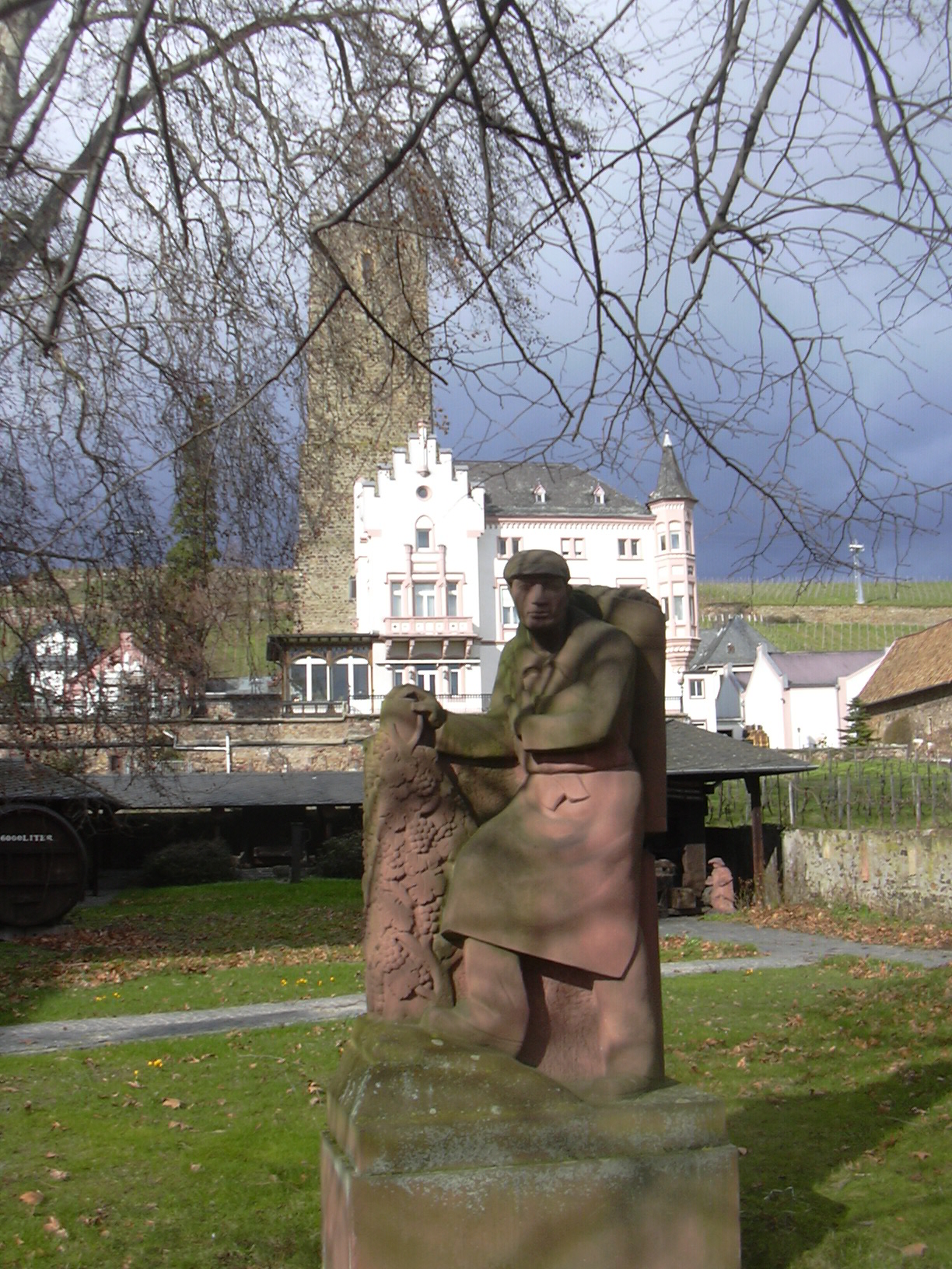 Rüdesheim Boosenburg, courtyard